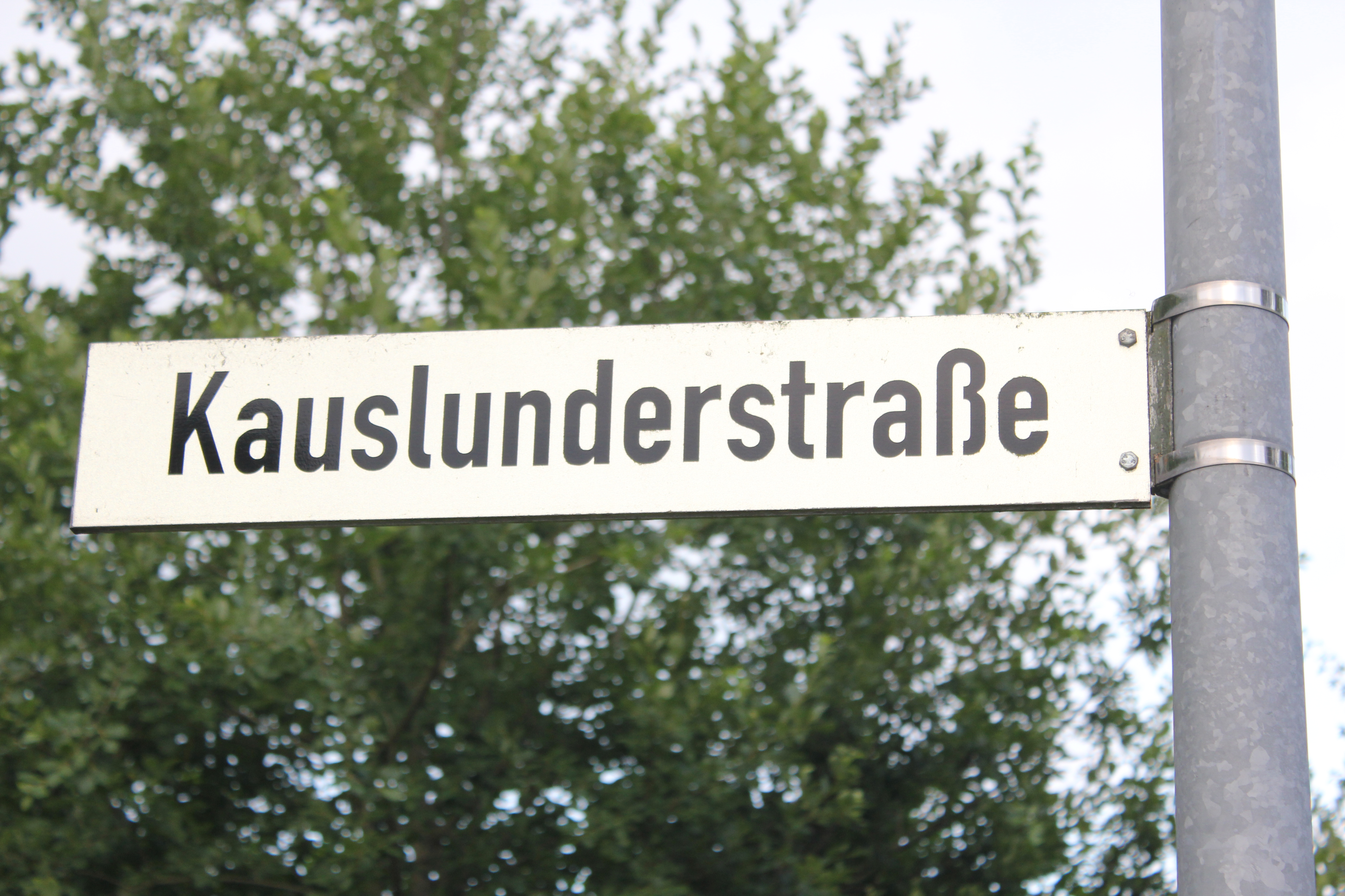 Straßenschild Kauslunder Straße, Flensburg, Bild 01